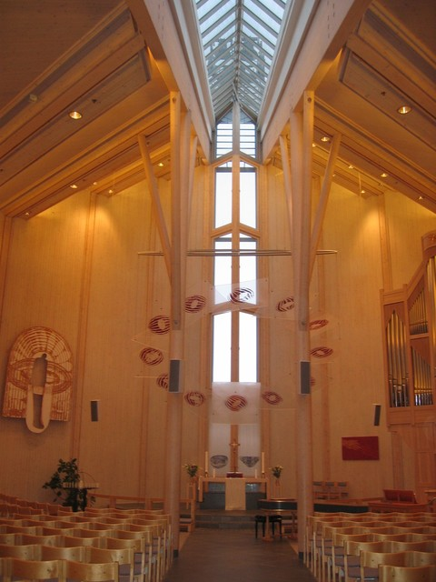 Grønnåsen kirke i Tromsø Interiør